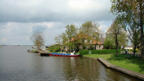 Nedersaksies: Neck_jisp_umgaeving.jpg